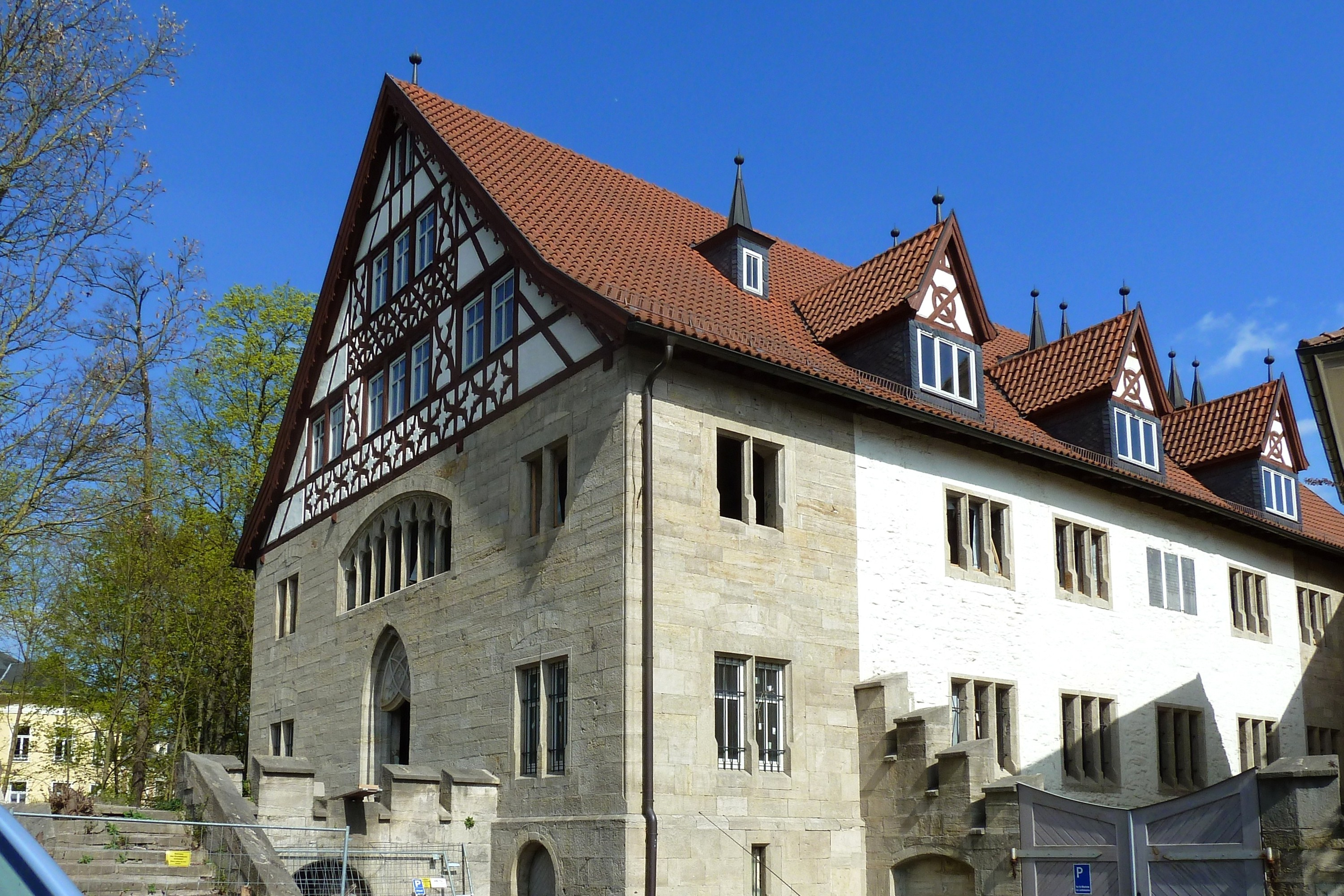 Das Zeughaus (Arsenal) in Meiningen, ehemaliger Hauptbau des 1239 gegründeten Franziskanerklosters. Dachgeschoss im 19. Jahrhundert erneuert.